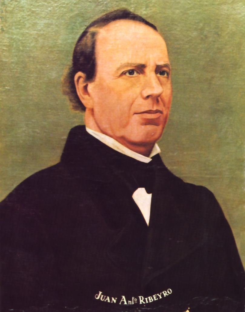 Juan Antonio Ribeyro y Estada ((1810 -1886) político peruano. Presidente del Consejo de Ministros y Canciller de la República. Bisabuelo del escritor Julio Ramón Ribeyro.